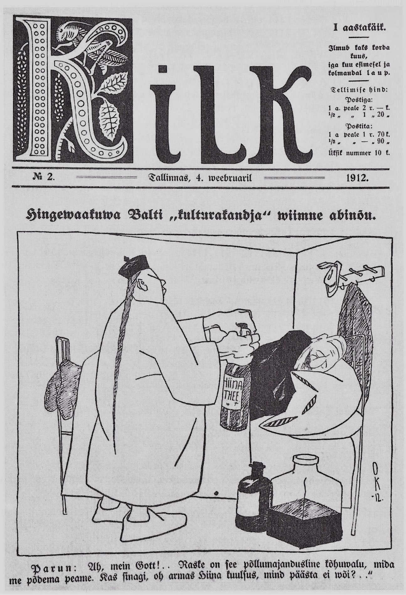 Ajaleht Kilk, 1912, nr 2. Esikaanel Otto Krusteni karikatuur